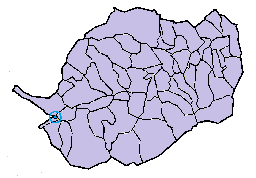 Montlluís en el Conflent, a partir del mapa municipal del Conflent de lliure disposició adaptat al Nomenclàtor toponímic aprovat el 2007